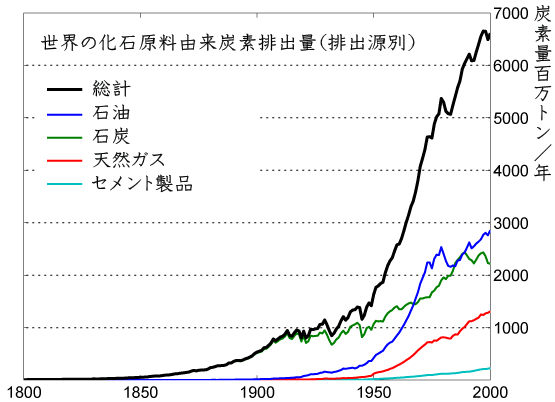 世界の化石原料由来炭素排出量（排出源別）